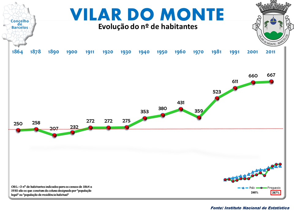 Censos 1864/2011